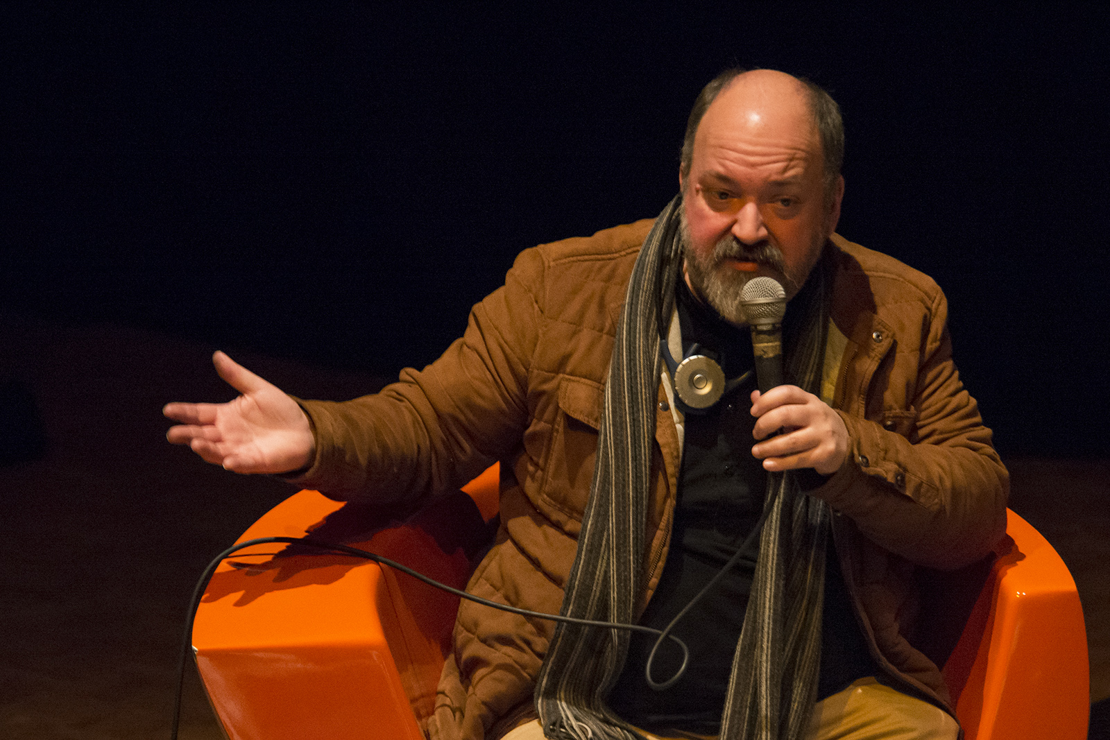 Dave McKean, rencontre animée par Xavier Guilbert, Festival d'Angoulême 2018.